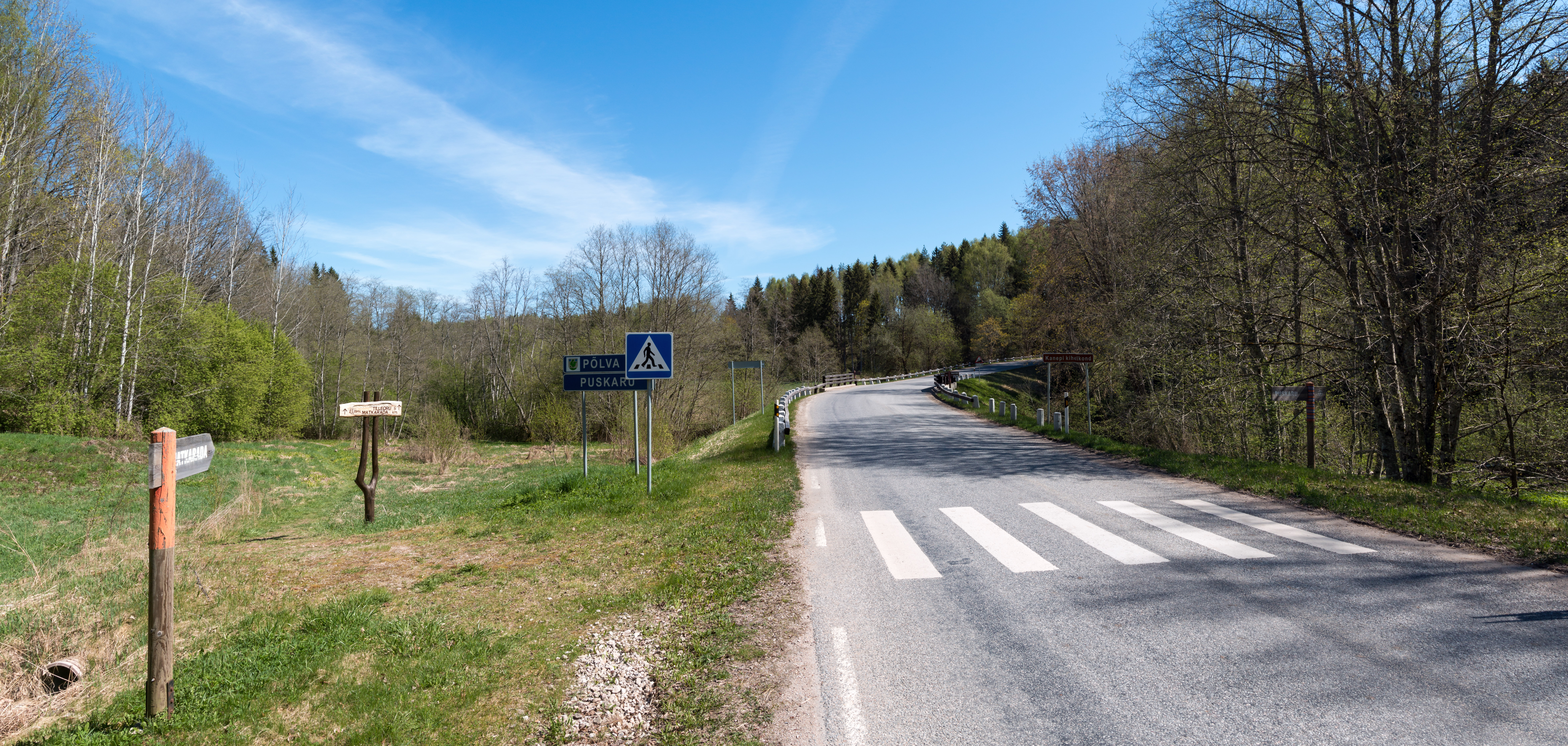 A view to the Tille bridge over the river Ahja in Tilleorg. Beginning of the Tilleoru hiking trail.